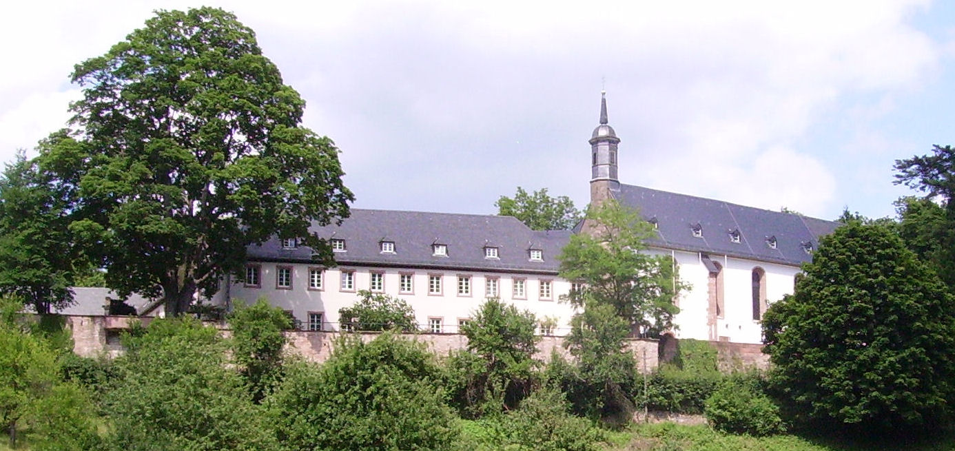 Stift Neuburg in Heidelberg-Ziegelhausen, Deutschland. Fiel durch Erbschaft an die Familie von Bernus, zunächst an Friedrich Alexander von Bernus (1838–1908) und dann sein Adoptivsohn Alexander von Bernus (1880–1965)